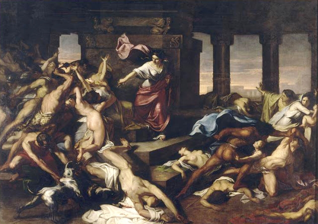 Troisième chef d’œuvre de Xavier Sigalon, présenté, sans succès, au Salon de 1827, désormais conservé au musée des Beaux-Arts de Nantes.